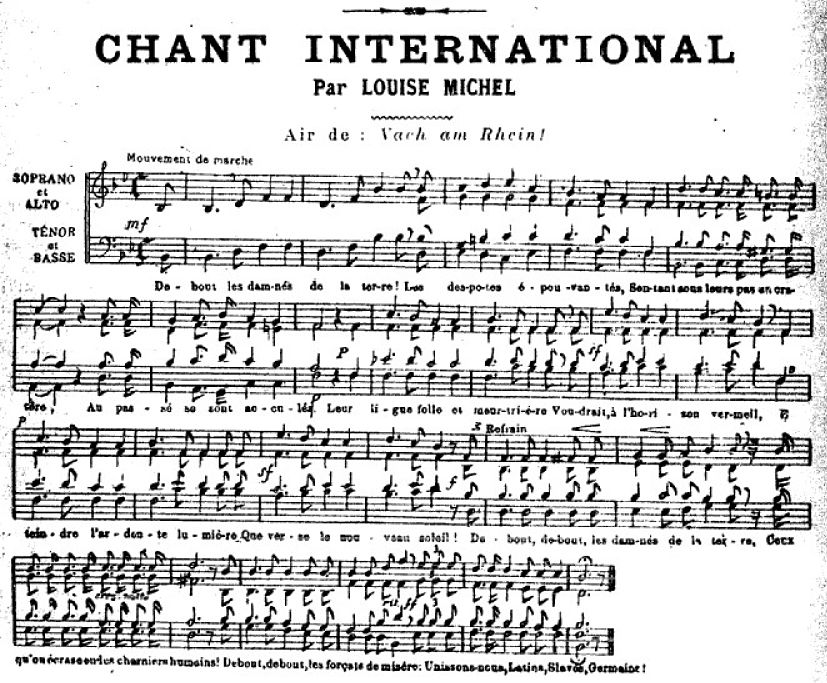 L’Internationale noire est une chanson anarchiste écrite par Louise Michel et publiée en 1897 dans l'Almanach du Père Peinard sous le titre de Chant international.